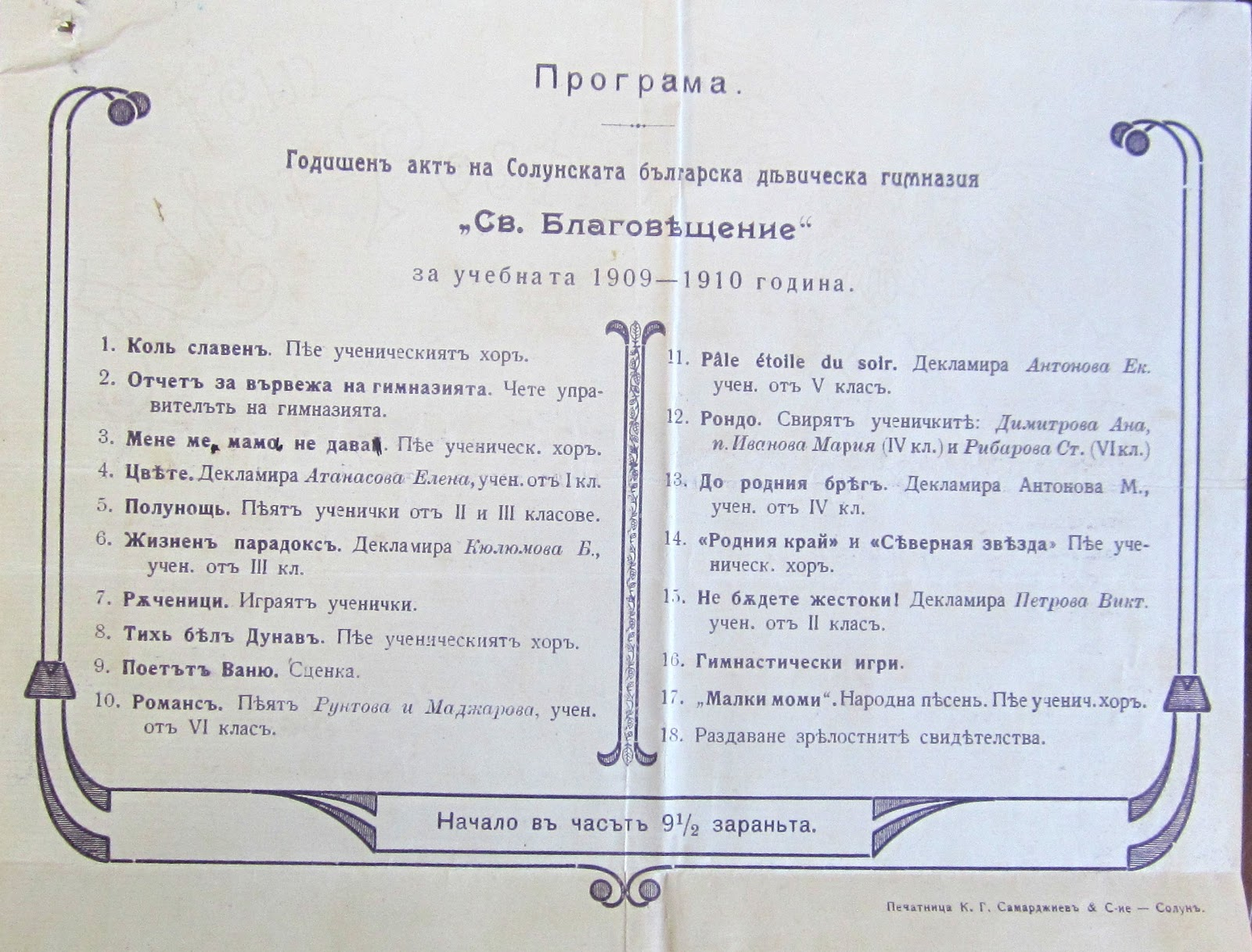 Годишен акт на Солунската българска девическа гимназия за 1909 - 1910